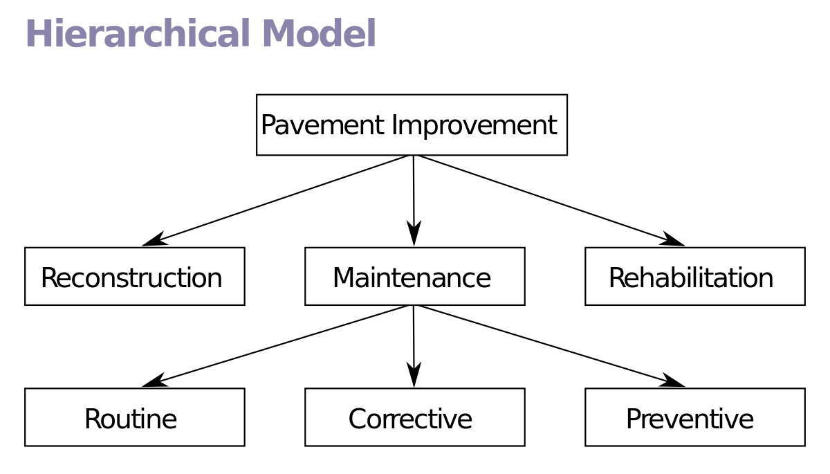 Монгол: Зураг 2 - Hierarchical model